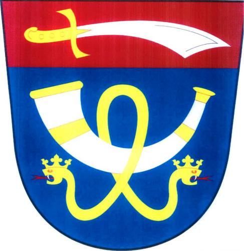 znak,Hospozín , okres Kladno